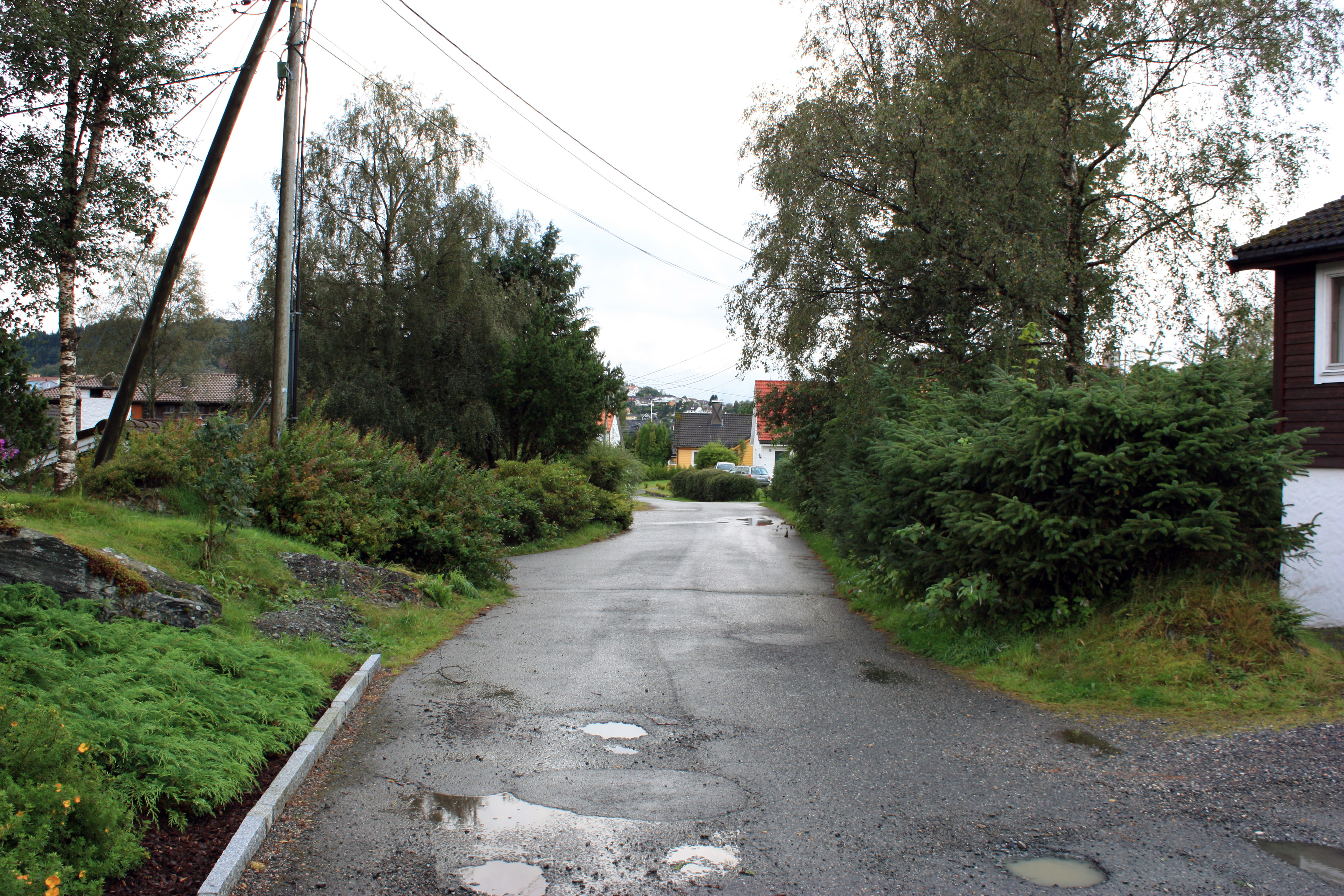 Dådyrvegen, Fana, Bergen.